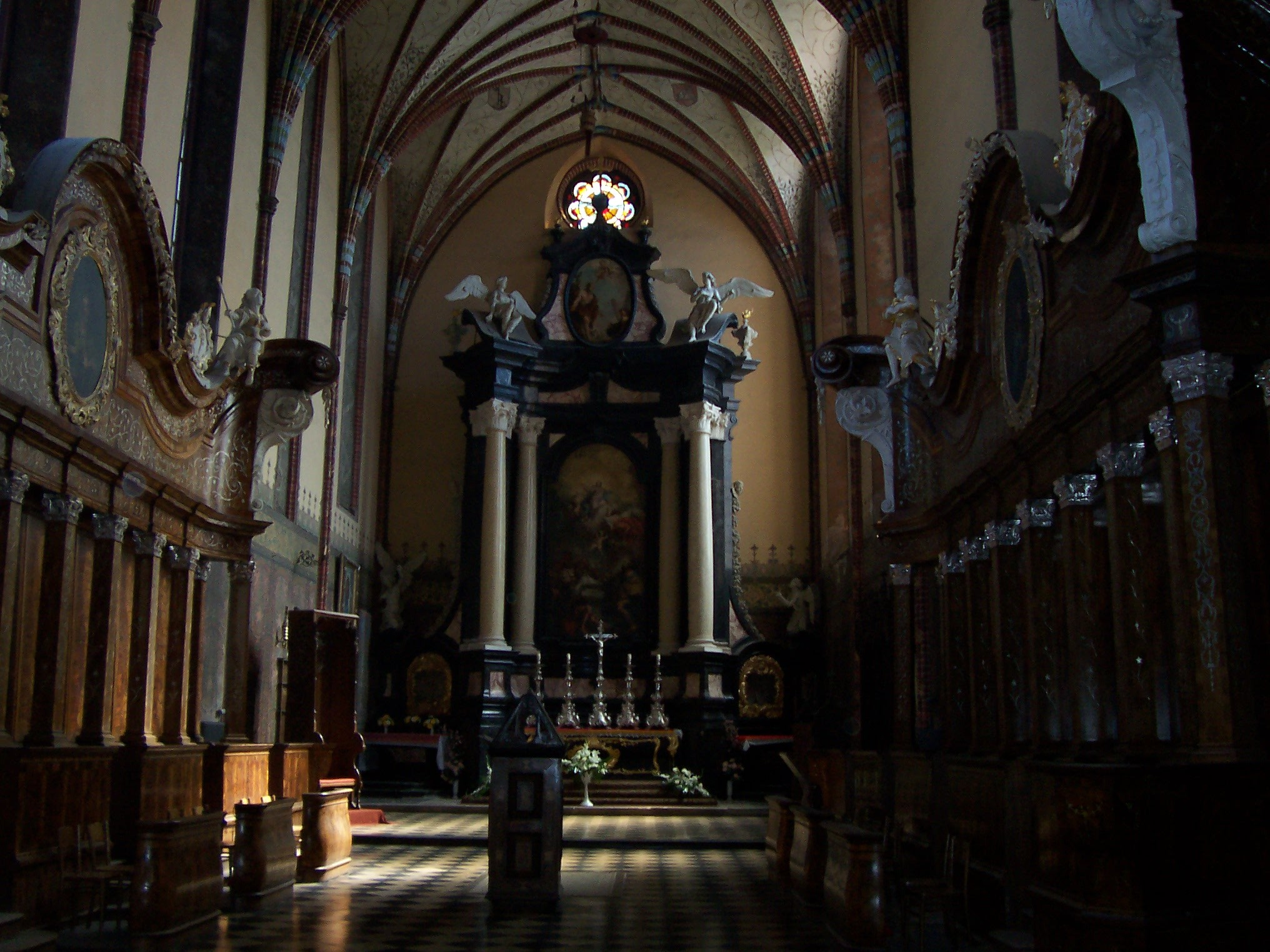 Prezbiterium we fromborskiej katedrze